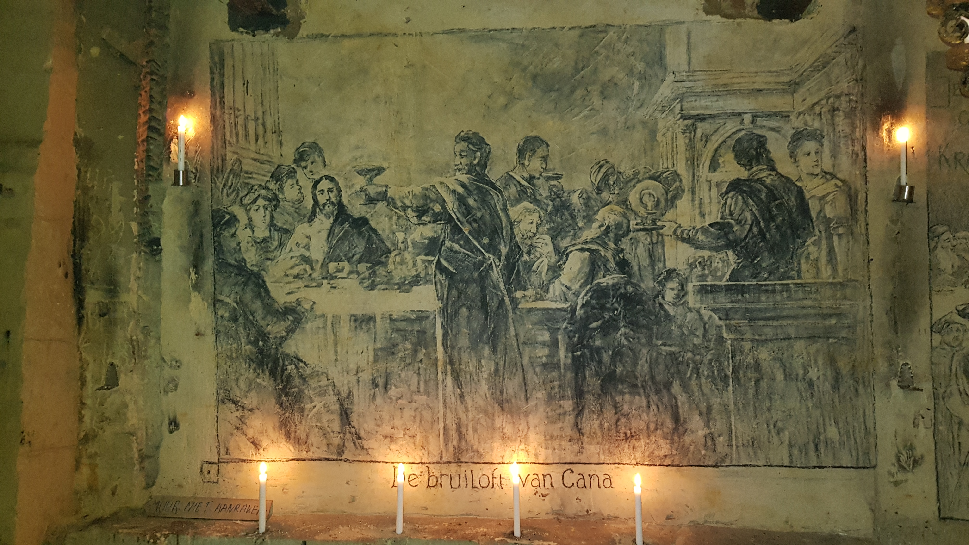 tekening in de Geulhemmergroeve, Geulhem, Nederland